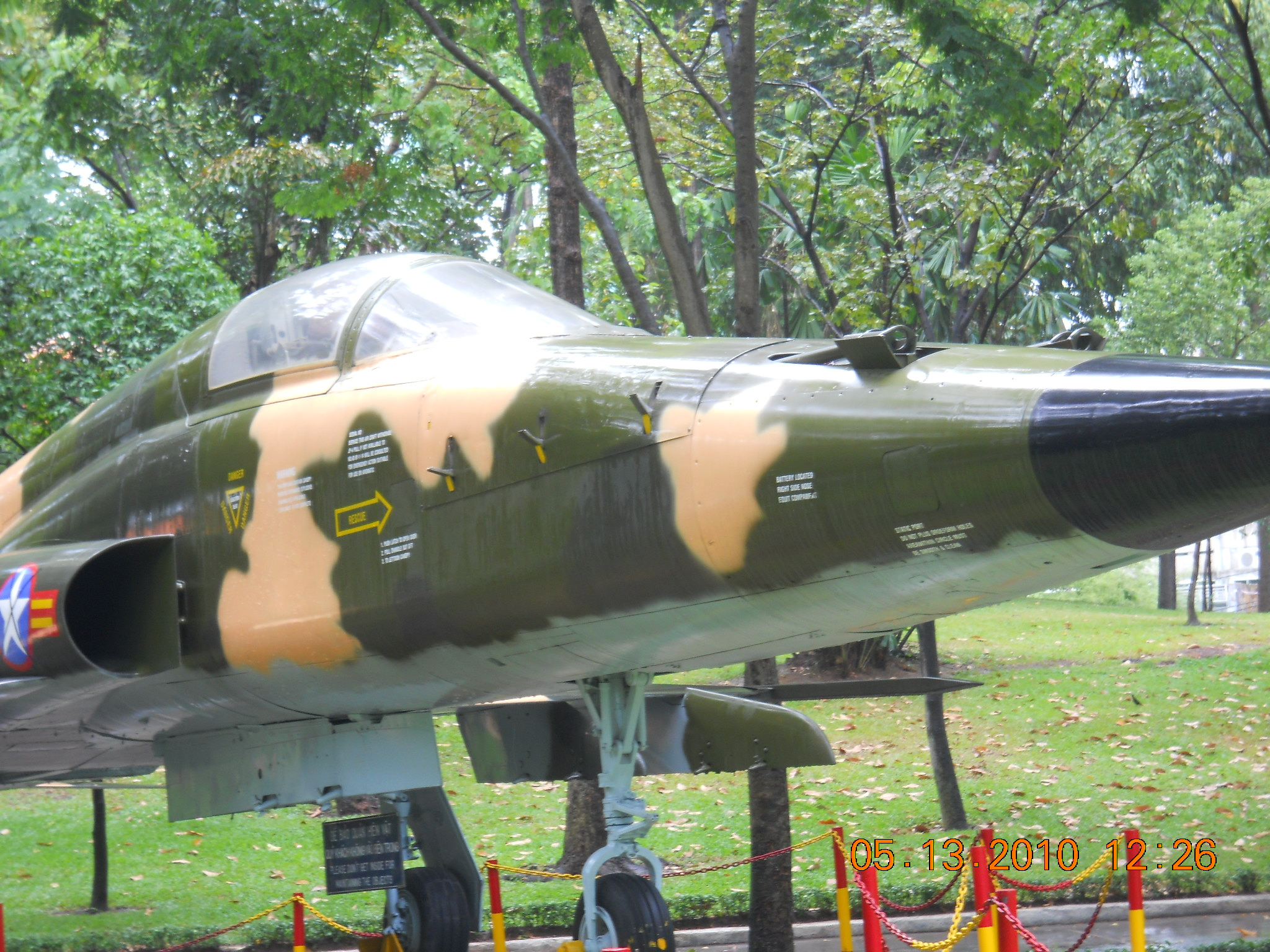 Chiếc máy bay Nguyễn Thanh Trung đã dùng ném bom xuống dinh Độc lập 10/4/1975